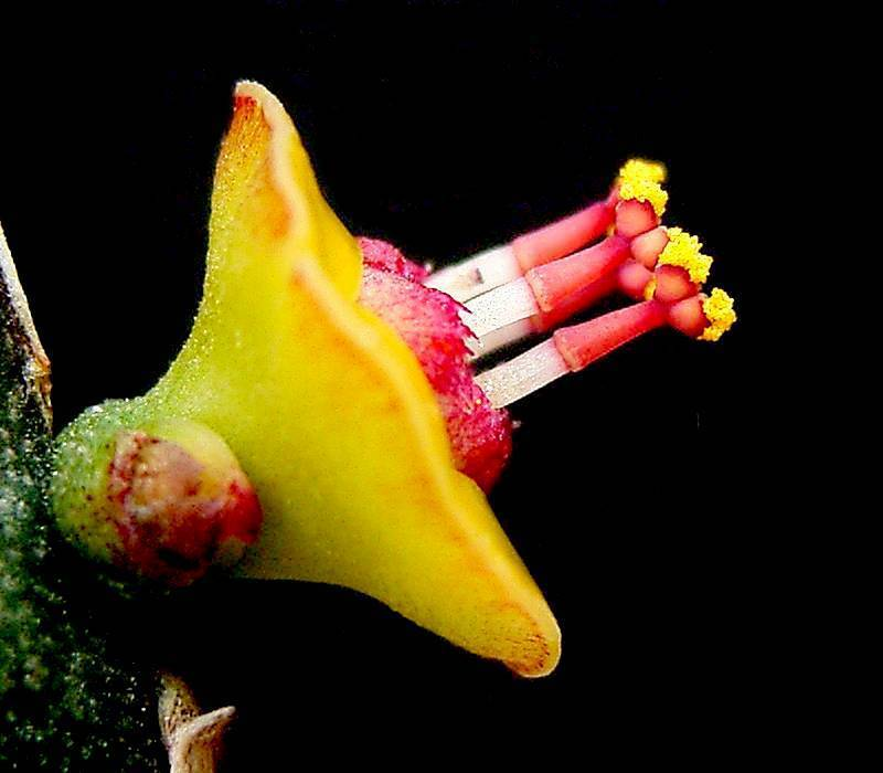 Euphorbia quadrilatera